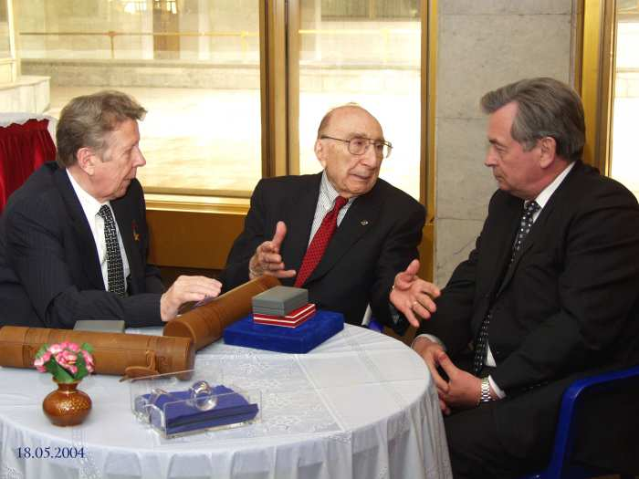 Евгений Иванович Чазов — советский и российский кардиолог, доктор медицинских наук, профессор, академик РАН. Майкл Эллис Дебейки (1908—2008) — американский кардиохирург, специалист в области хирургии. Всеволод Арсеньевич Ткачук — советский и российский биохимик. Академик РАН (2006). Декан Факультета фундаментальной медицины МГУ им. М. В. Ломоносова.